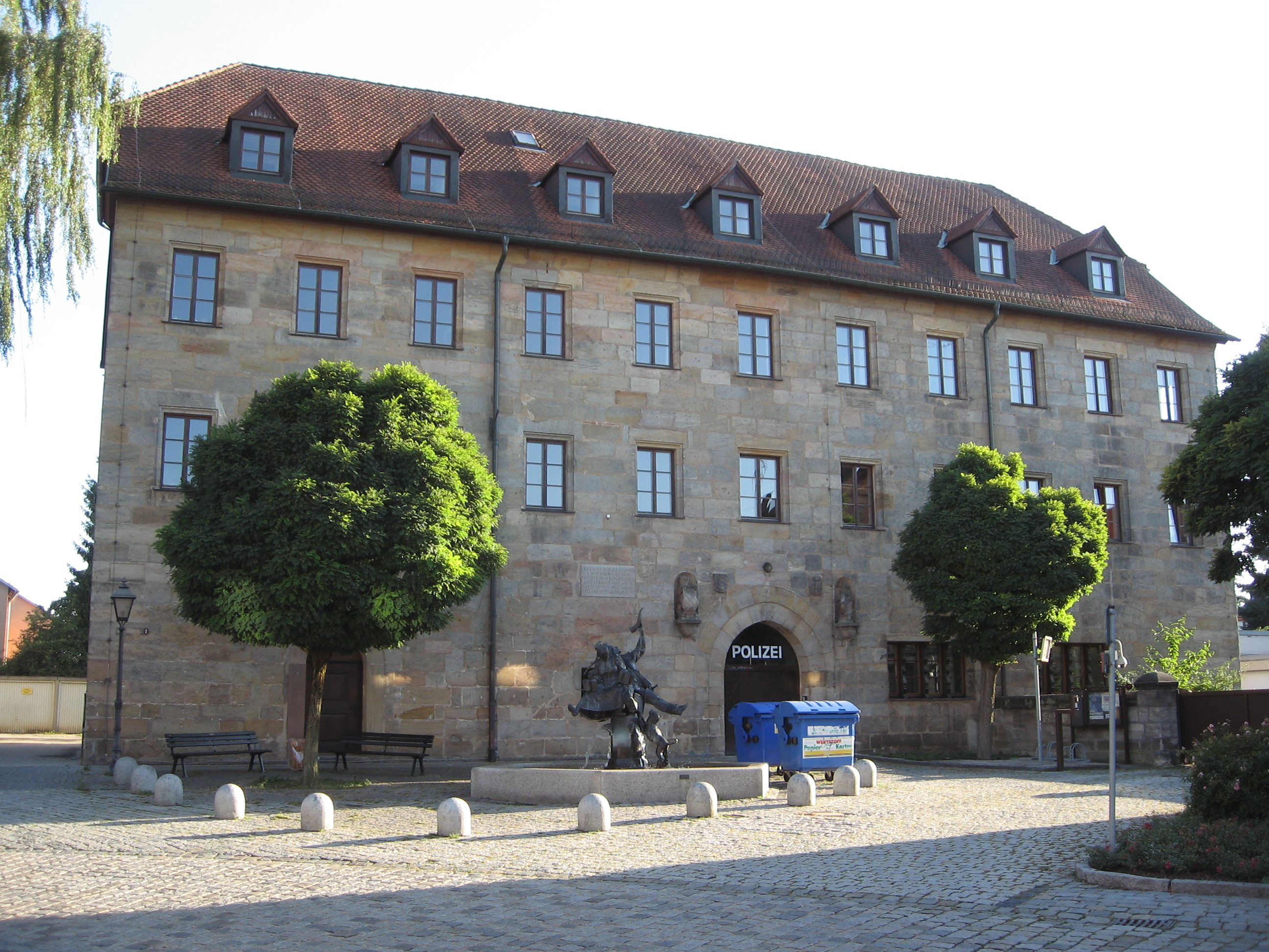 Cultural heritage monuments in Altdorf bei Nürnberg.